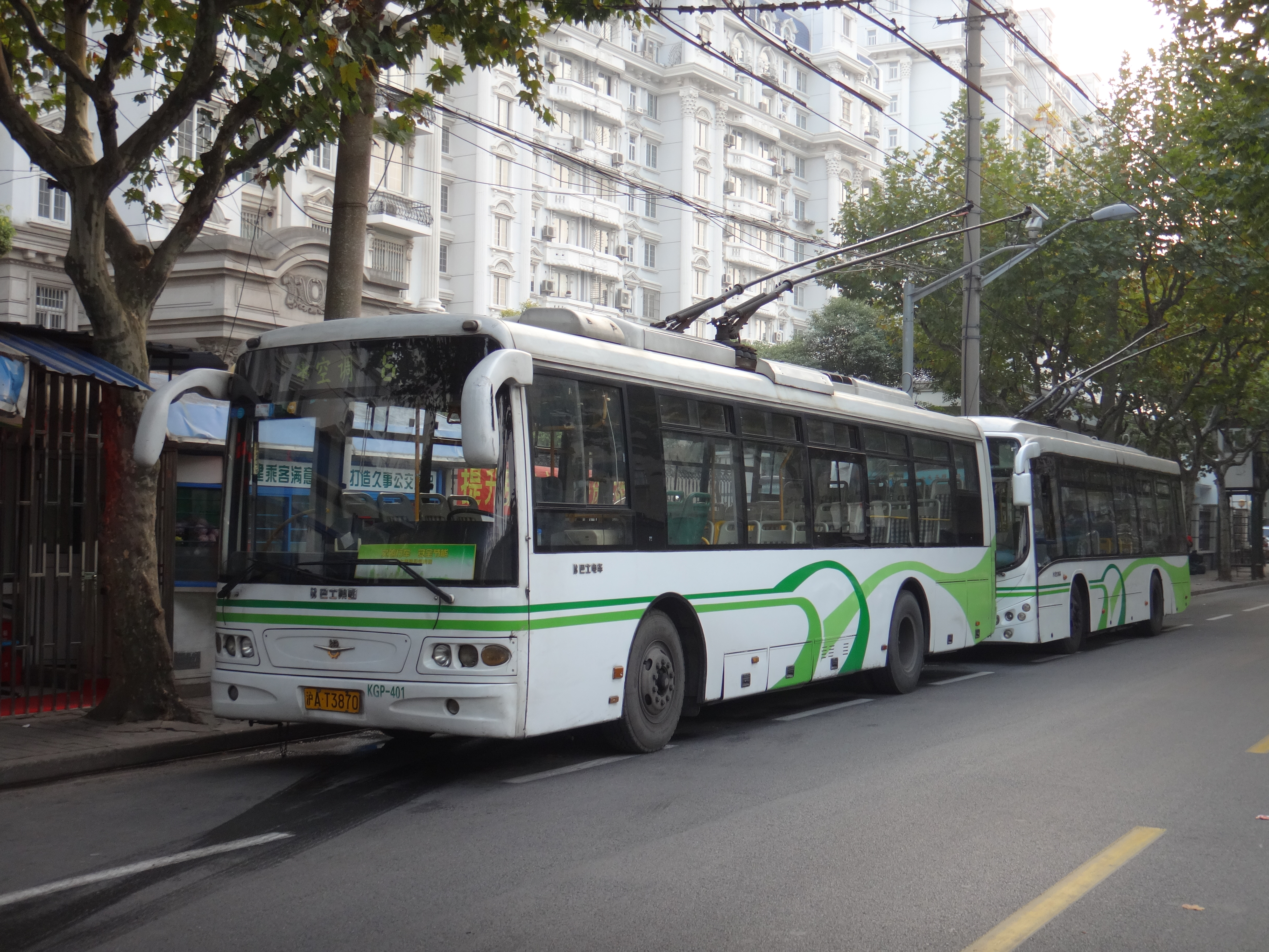 中文（中国大陆）: 上海公交6路，自编号KGP-401，车型SWB5105KGP-3，摄于长白路图们路。